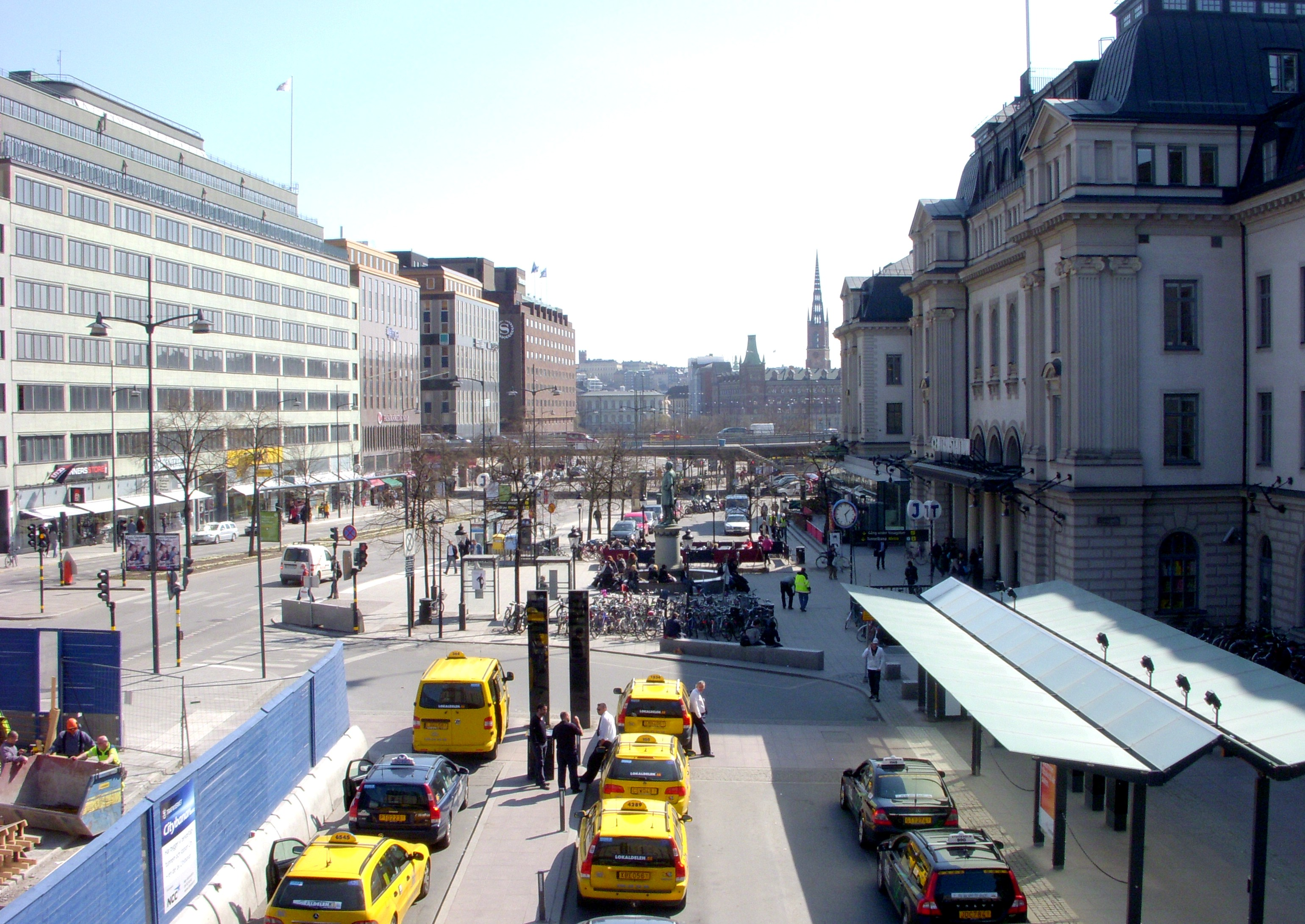 Centralplan med Stockholms central och Esselte-huset